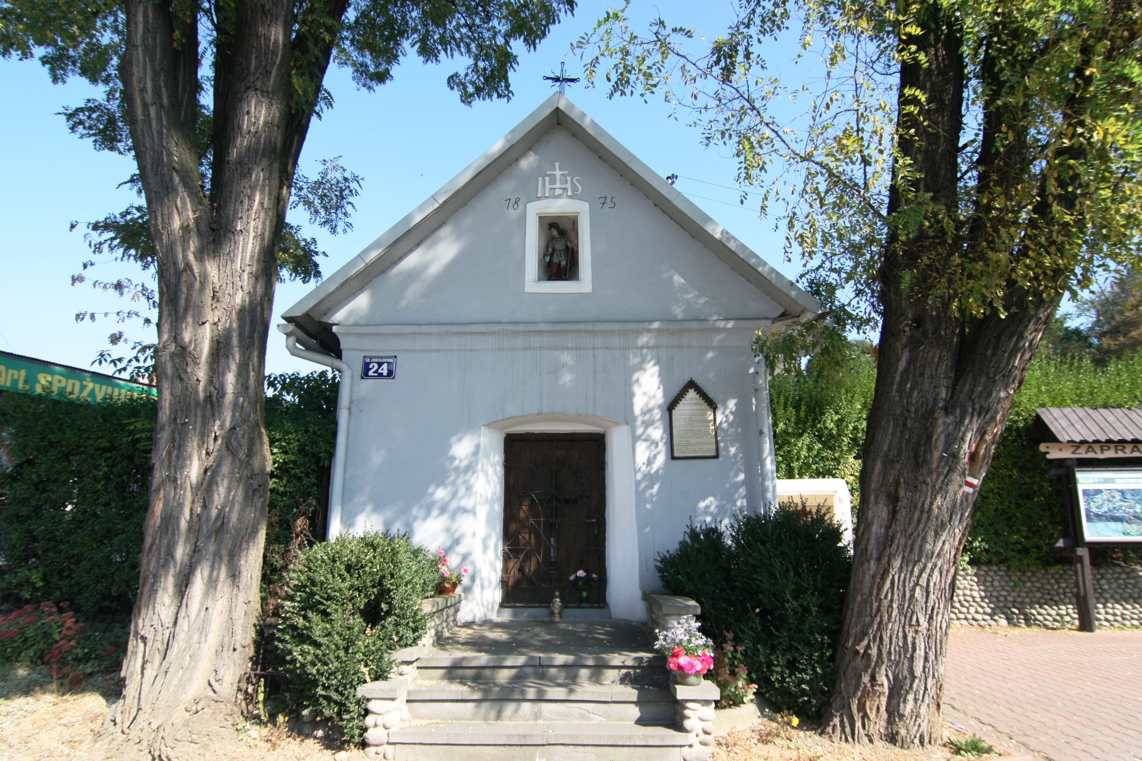 Wotywna kapilca św. Rocha przy ul. Zdrojowej w Krościenku nad Dunajcem